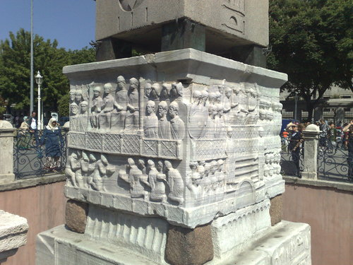 İstanbul'da Hipodrom Meydanı'nda bulunan Dikilitaş.